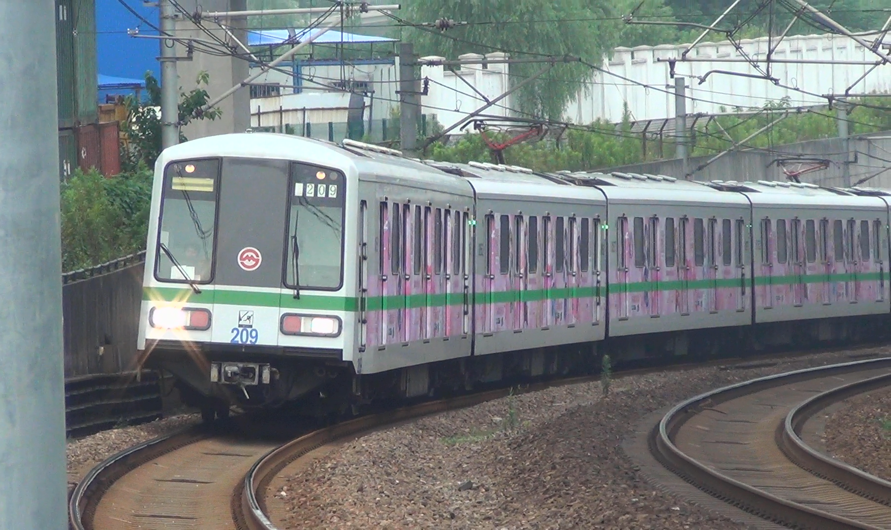 AC02LoveLive列车下行通过龙阳路-张江高科之间高架